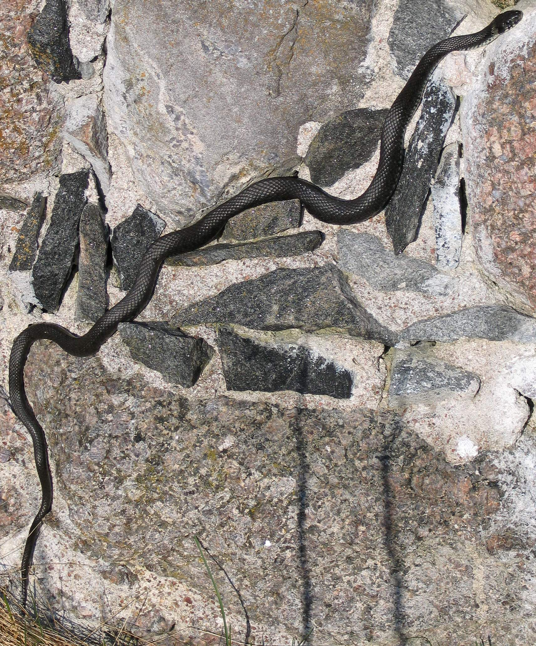 Sich sonnende Ringelnatter (Natrix natrix natrix), fotografiert im April 2004 von soebe in Schweden. Author: soebe Date: April 15, Location: Sweden Beschreibung: Das Foto entstand im April 2004 zwischen den Trümmern einer Burgruine in Schweden. Um eine Nahaufnahme von dem Tier machen zu können, hatte ich mich über die Steine, die innerhalb der Burgruine lagen, vorsichtig angenähert. Dabei hatte ich einen losen Stein leicht erschüttert. Davon aufgeschreckt hatte sich die Ringelnatter unter einem Stein zurückgezogen. Nach einer Weile guckte das Tier sichernd zwischen den Steinen hervor. Dabei konnte ich eine kleine Fotoserie vom Kopf und Rumpf des Tieres aus nächster Nähe schiessen. Von diesen Bildern ist meines Erachtens das schönste. Nachdem sich das Tier davon überzeugt hatte, das ihm keine Gefahr droht, kroch es in der Grundmauer der Burgruine hinauf und sonnte sich dort. Dort konnte ich das Tier in ganzer Länge fotografieren.